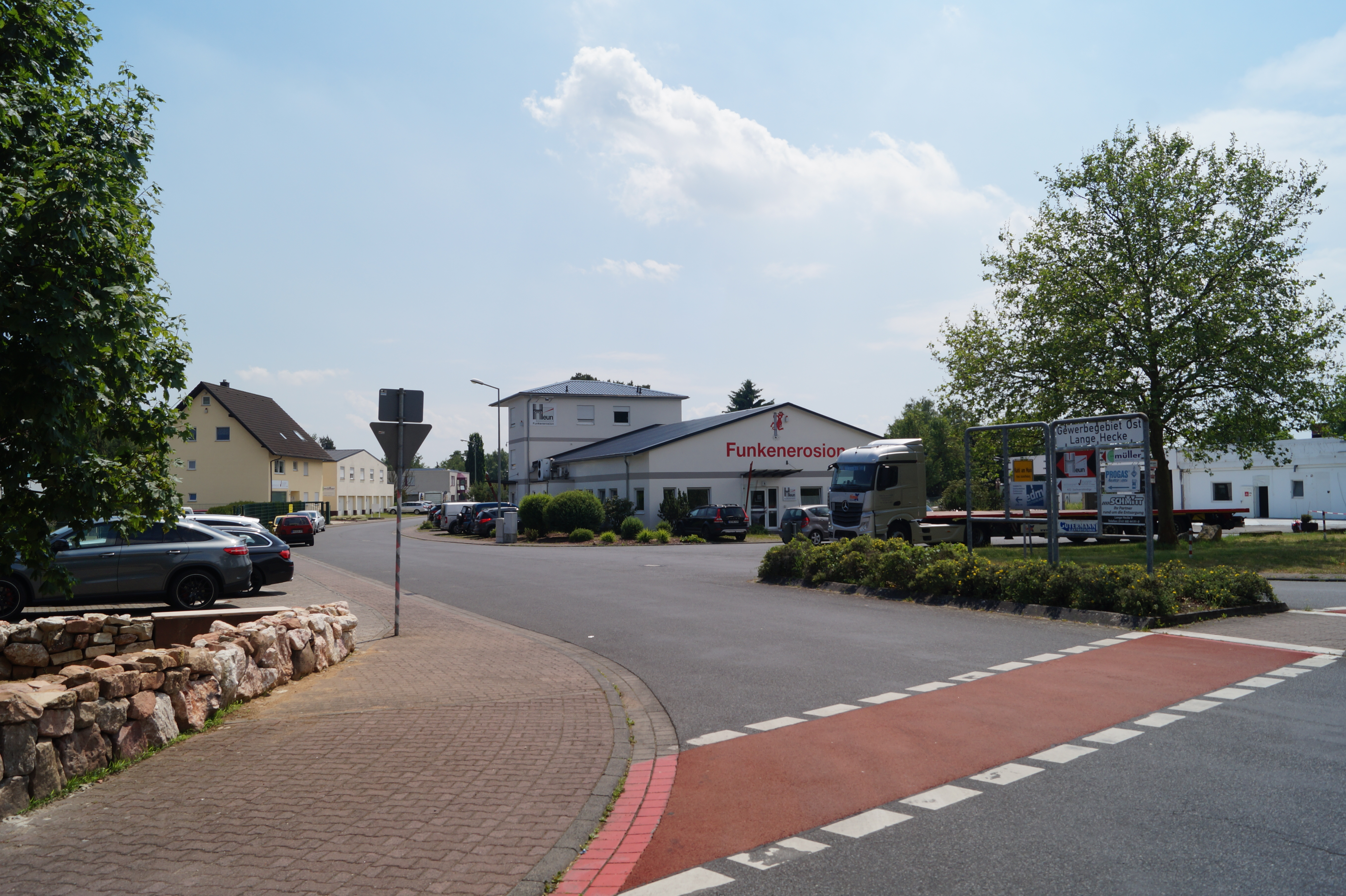 Industriegebiet "Lange Hecke" in Kahl am Main, Unterfranken. Archäologische Fundstelle nach Überbauung.